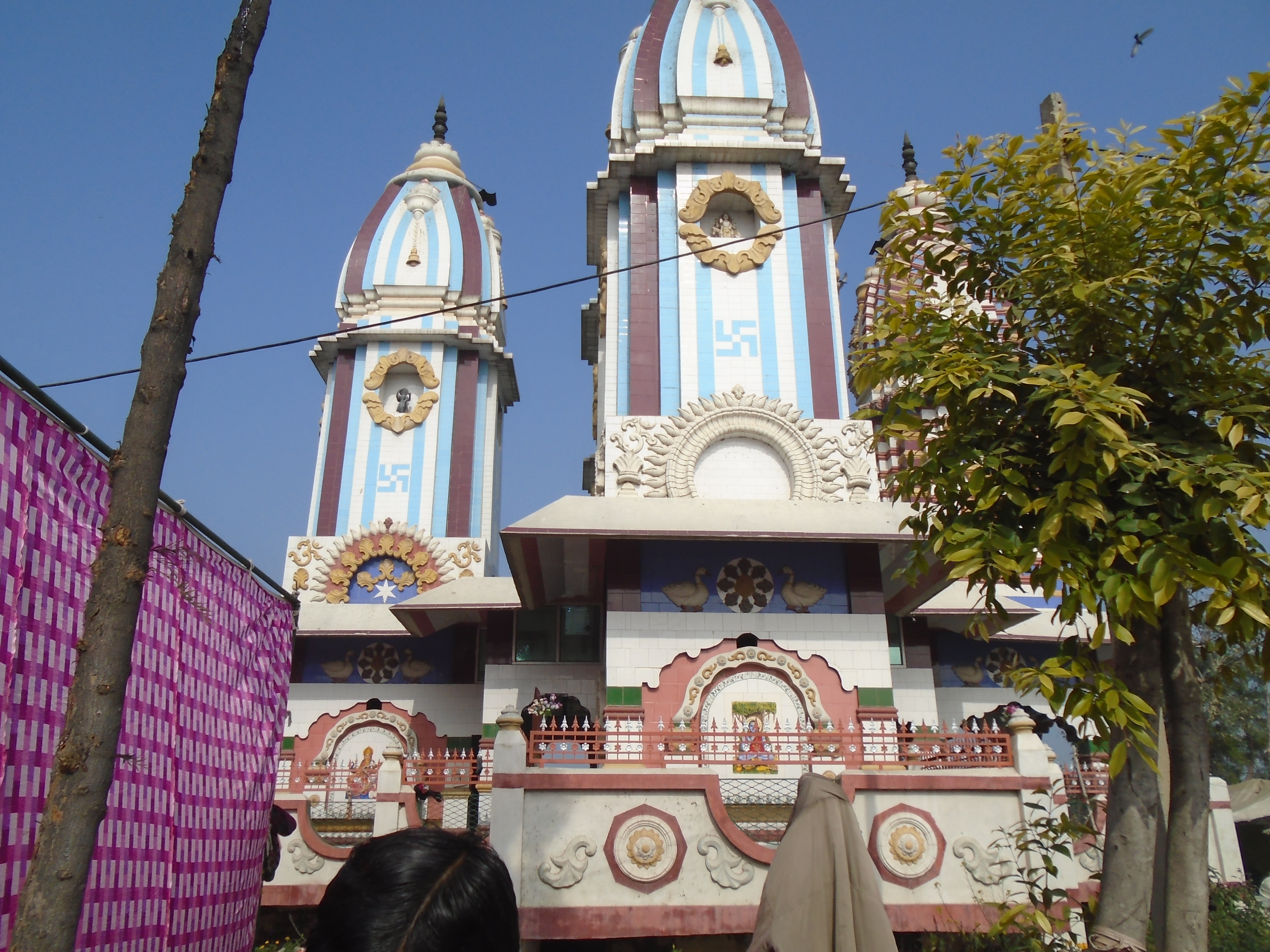 बाबा सरबंगी डेरा जयसिंहपुरा